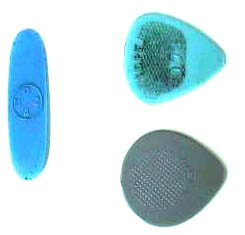 Plectrums.